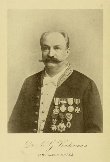 Foto van Alphonse Guillaume Vorderman